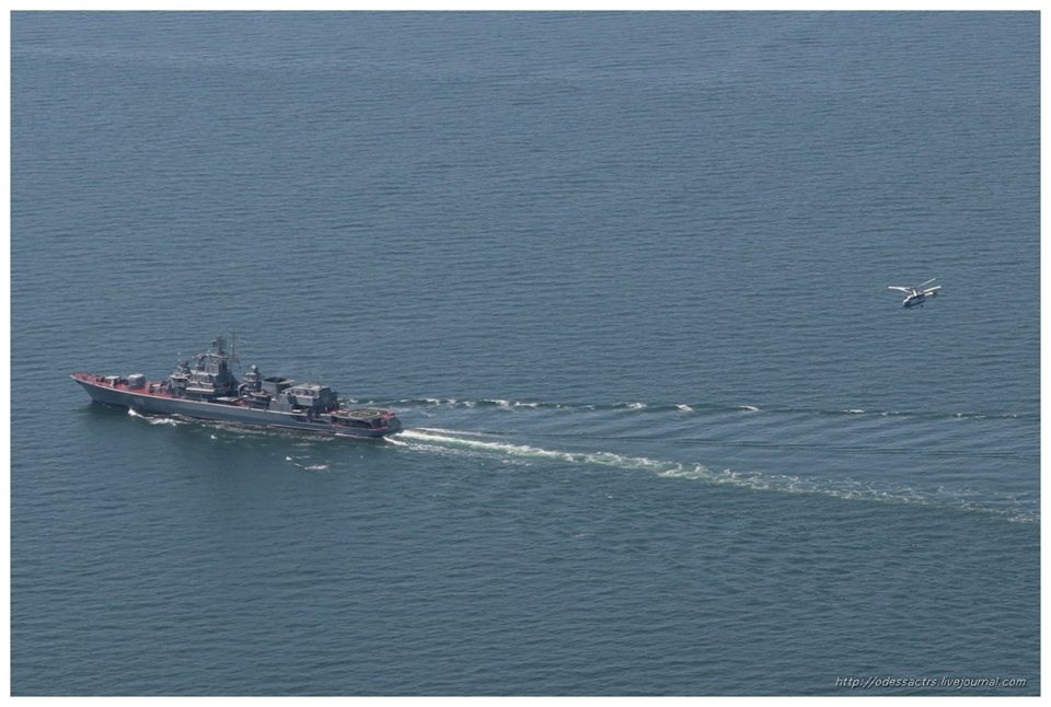 Фрегат “Гетьман Сагайдачний” патрулює в Аденській затоці Фрегат Військово-Морських Сил Збройних Сил України “Гетьман Сагайдачний” з ґвинтокрилом КА-27ПР і підрозділом спеціального призначення зі штатним озброєнням на борту, у складі багатонаціонального корабельного з’єднання приступив до виконання завдань операції “Океанський щит” в Аденській затоці. Український військовий корабель вже подолав кілька сотень морських миль в районі Аденської затоки і безпосередньо розпочав патрулювання разом з кораблями флотів США, Данії та Нідерландів. Фото Павло Парфенюк